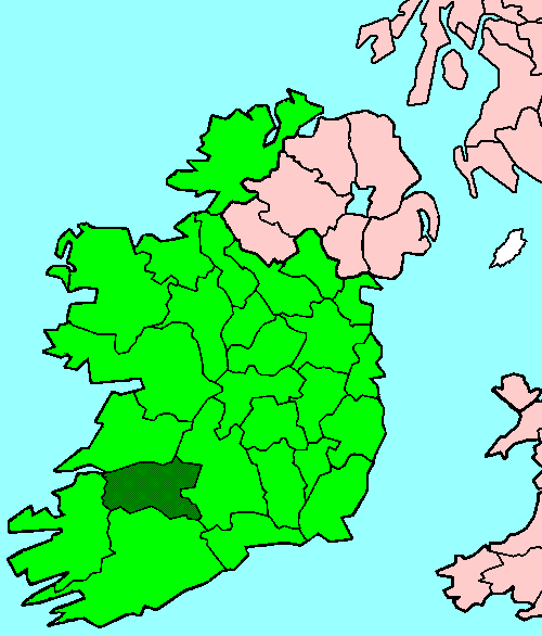 Limerick